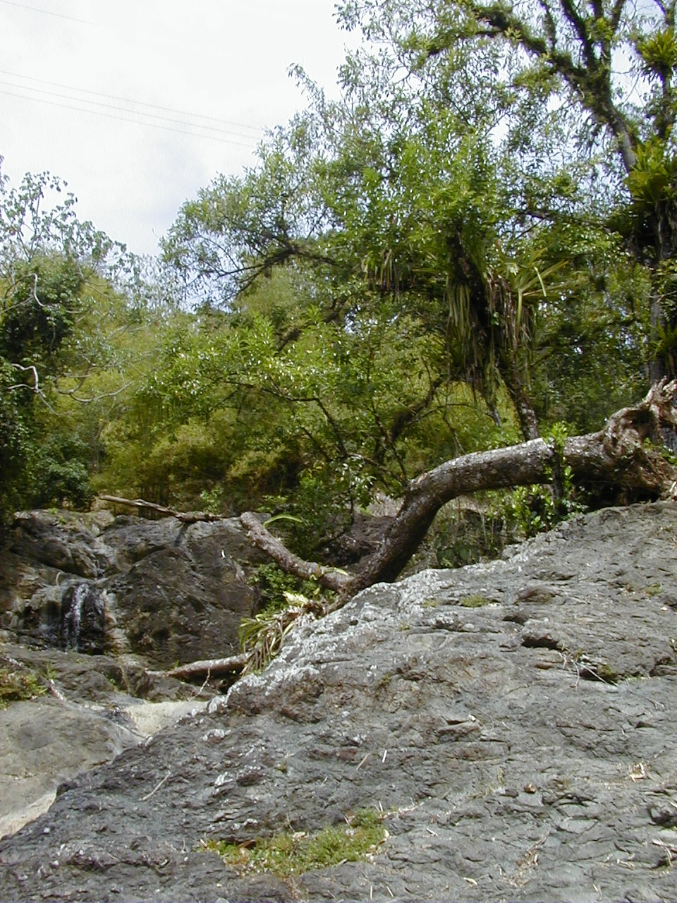 Wasserfall im Regenwald v. Tobago.